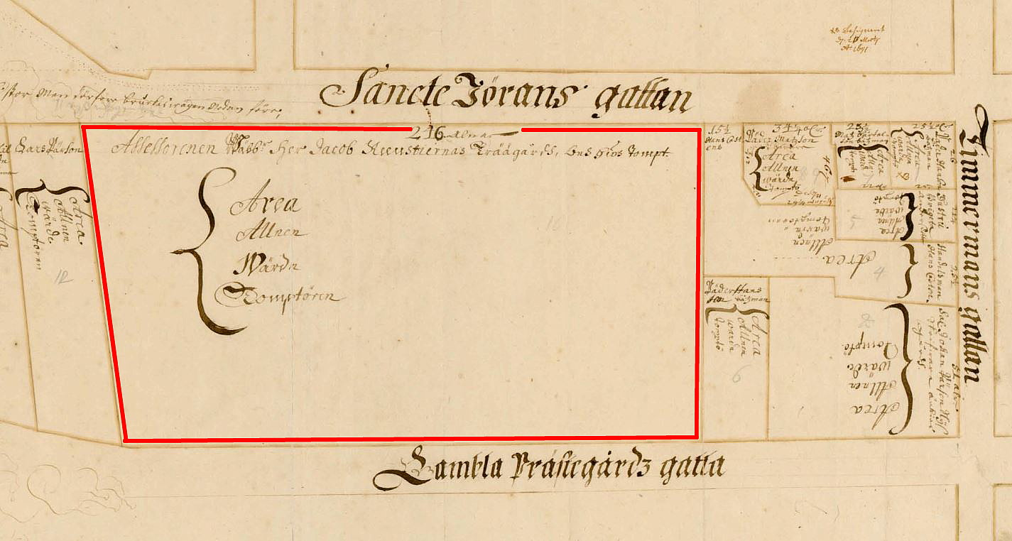 Reenstiernska tomten i Holms tomtbok